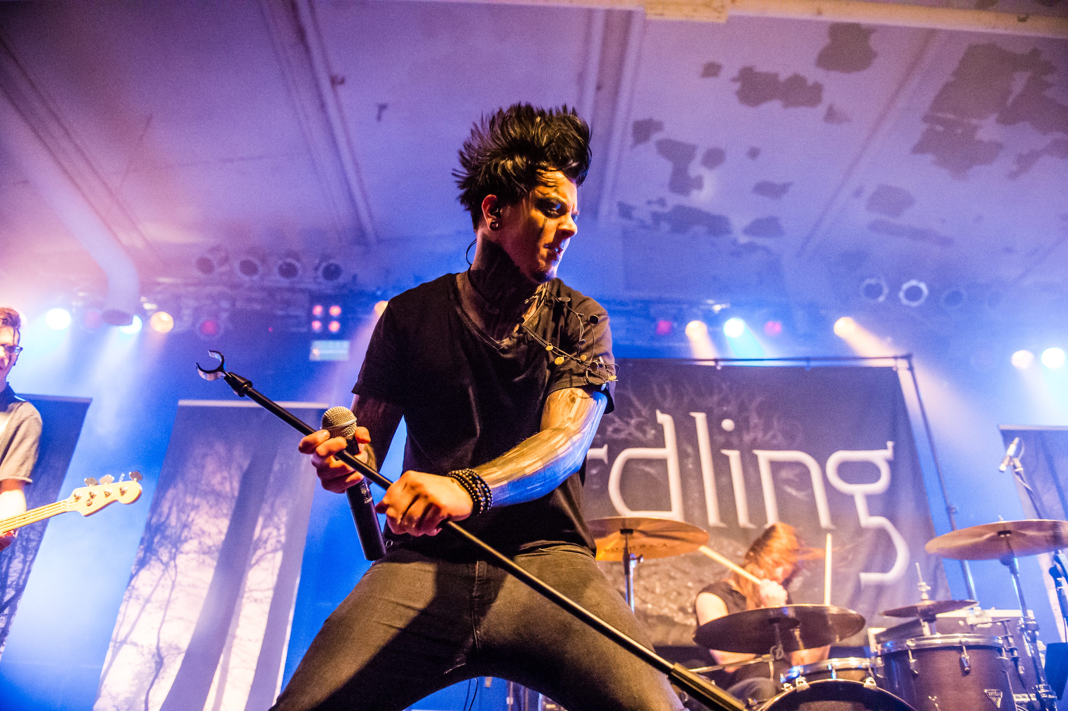 'Erdling Support für Megaherz Erdwärts Tour - Köln Essigfabrik'